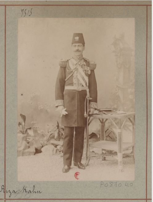 Mirza Riza Khan Atelier Nadar (1875-1895)